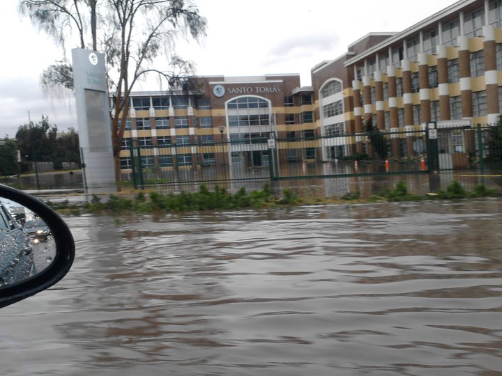 Universidad Santo Tomás sede La Serena, inundada por lluvias del día 6 de junio de 2011.